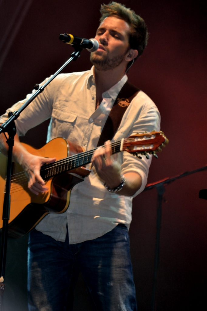 Concerto de Pablo Alboran em Cantanhede, Portugal